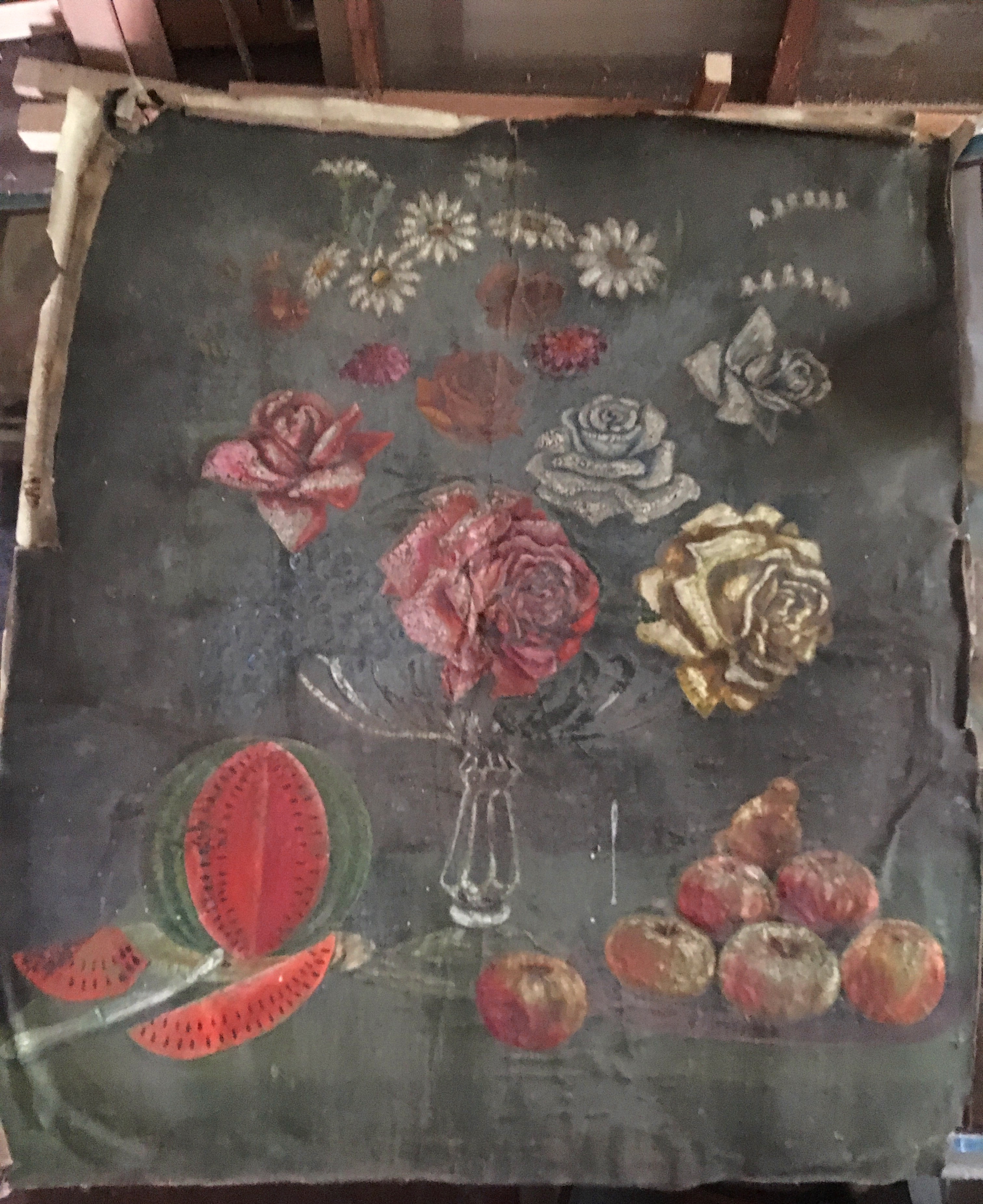 холст - картина, написанная, вероятно, ЗК из Унжлага в 50х годах, найдена в д. Малая Торзать в нежилом доме